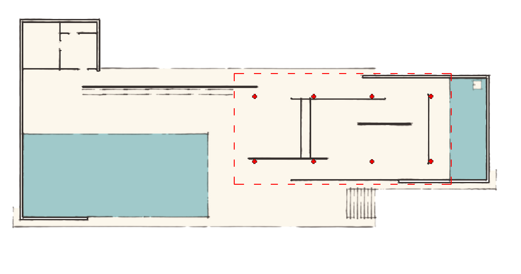 nota sobre la disposición reticular de pilares en el Pabellón de Barcelona, independiente de los cerramientos verticales